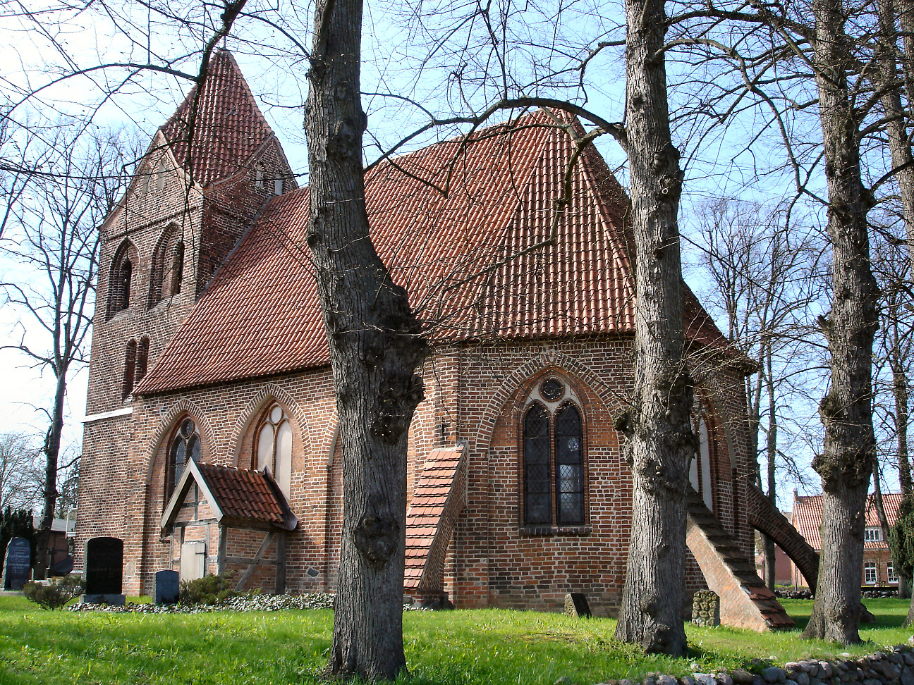 Kirche in Dorf Mecklenburg / Church in Dorf Mecklenburg